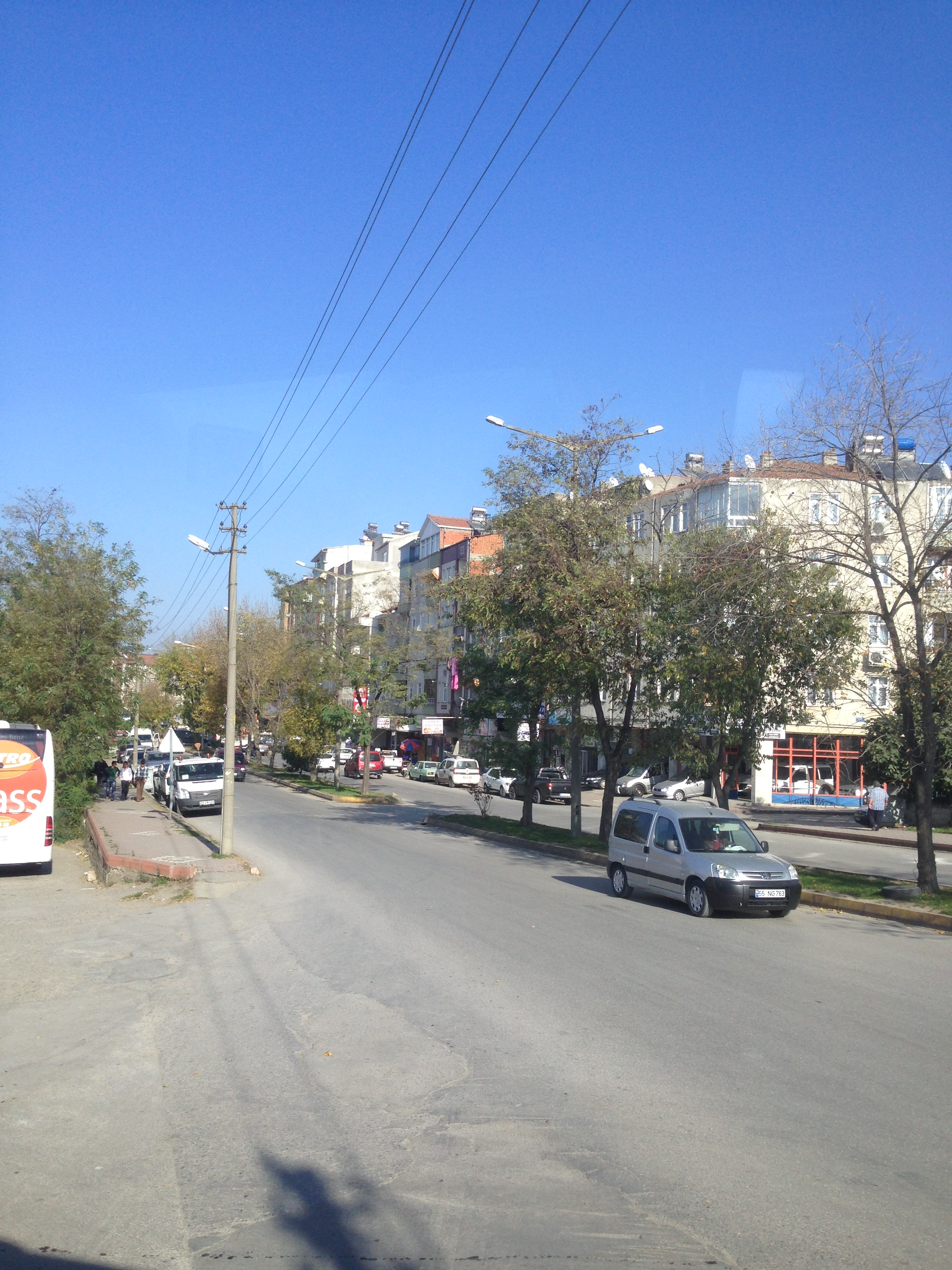 Bafra'dan çeşitli görüntüler